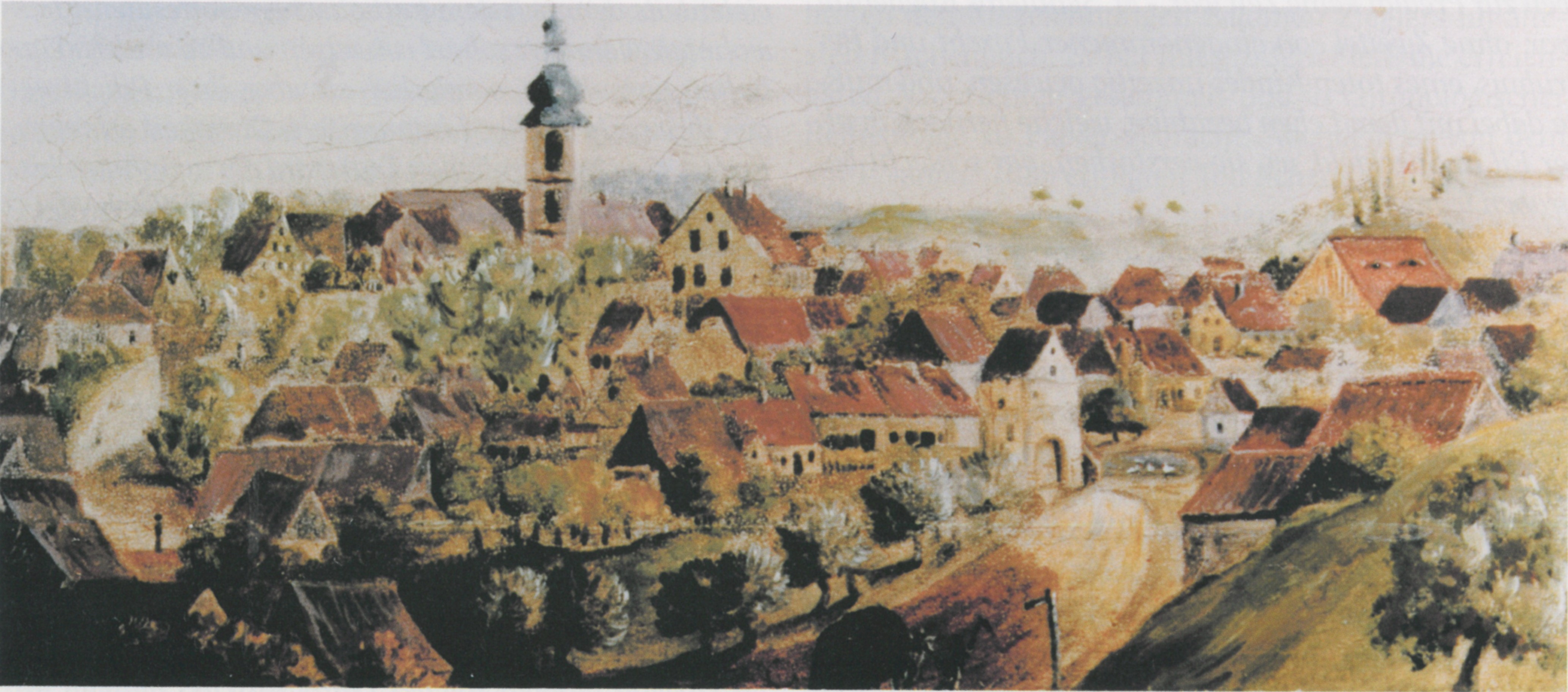 Gemälde, Markt Einersheim vom Point aus, um 1800, ursprünglich im Schloss Speckfeld